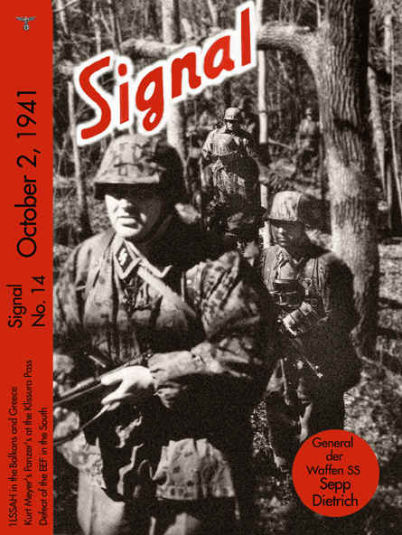 Обложка журнала "Signal" за 2 октября 1941